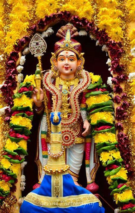 Muruga